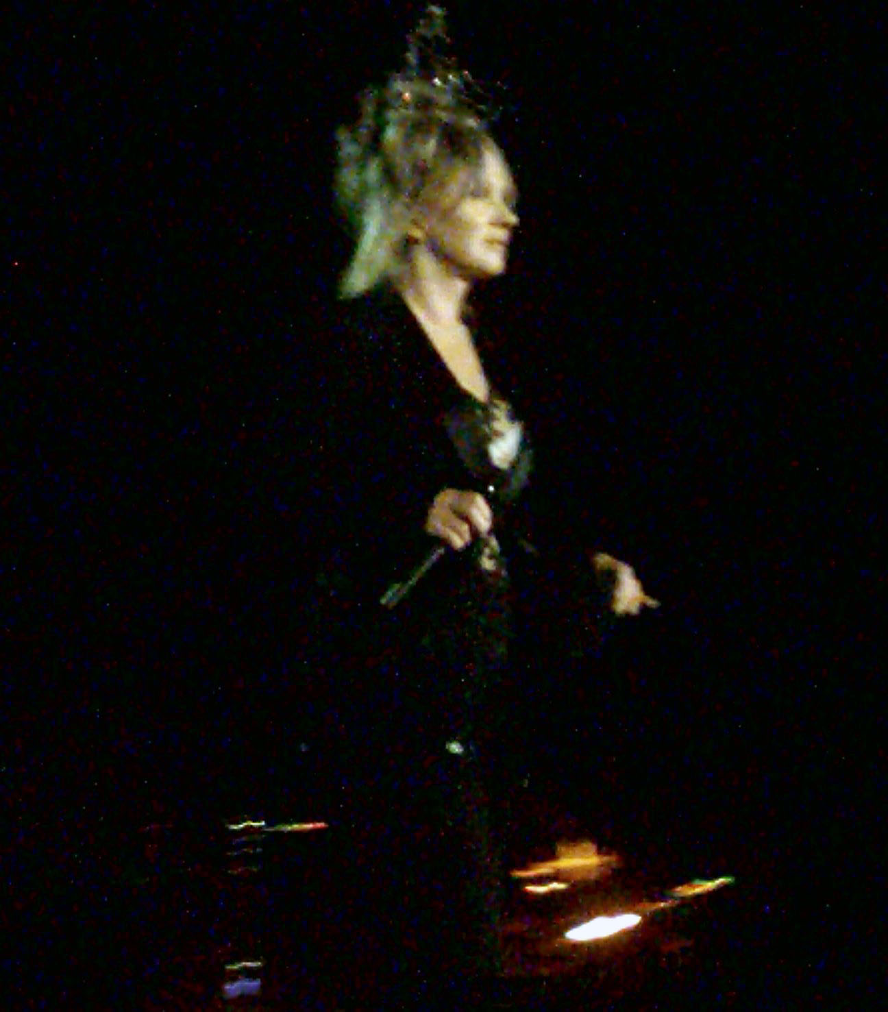 Spectacle Sinéquanone de Diane Dufresne offert lors de la soirée d'ouverture de la 22e édition des FrancoFolies de Montréal